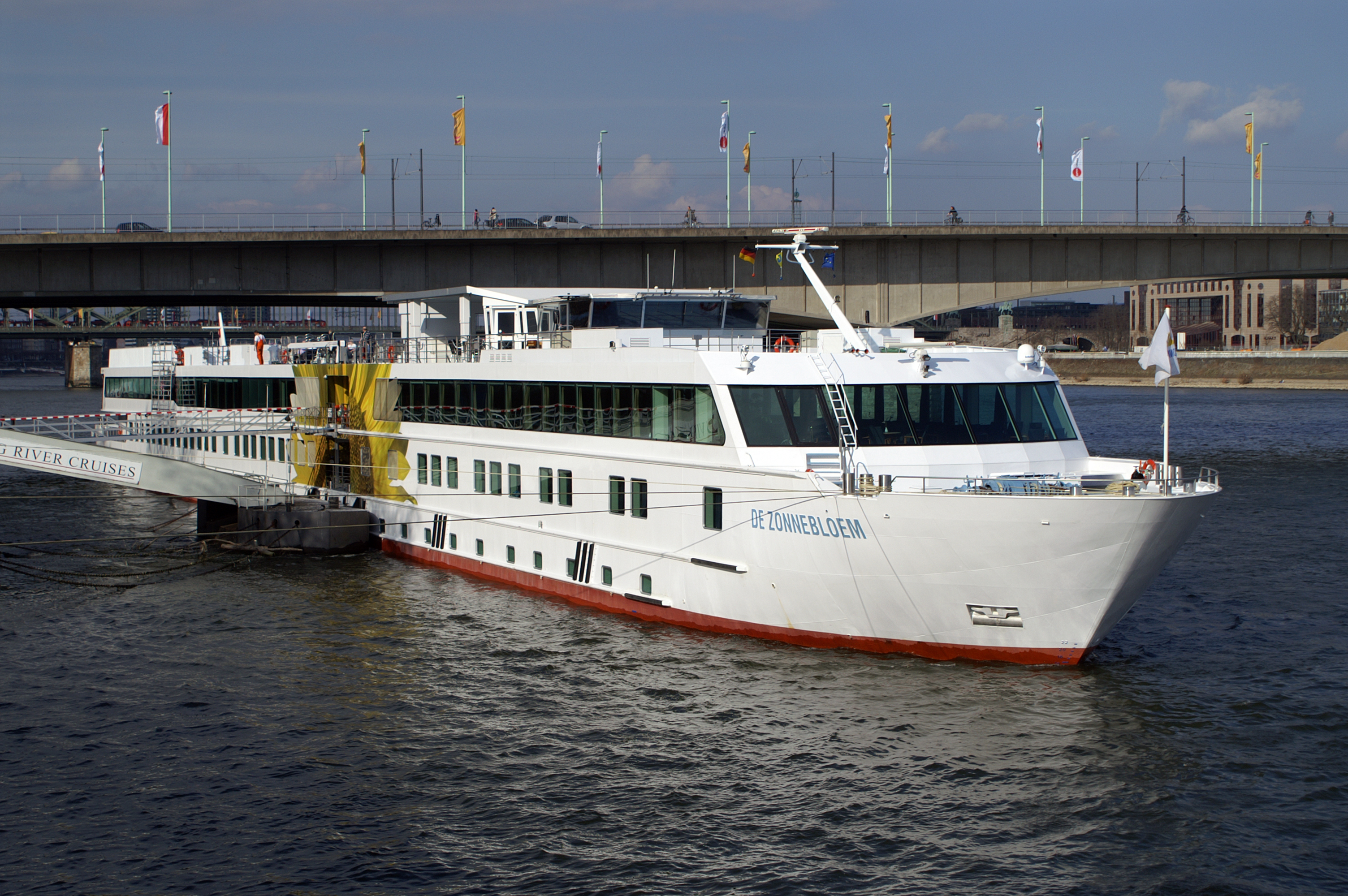 Flusskreuzfahrtschiff De Zonnebloem am Anleger Köln.